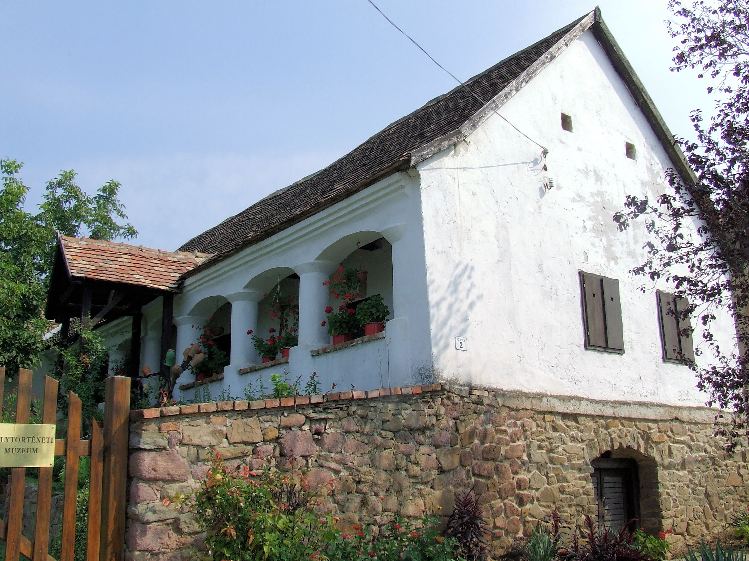 A bakonyai helytörténeti múzeum épülete